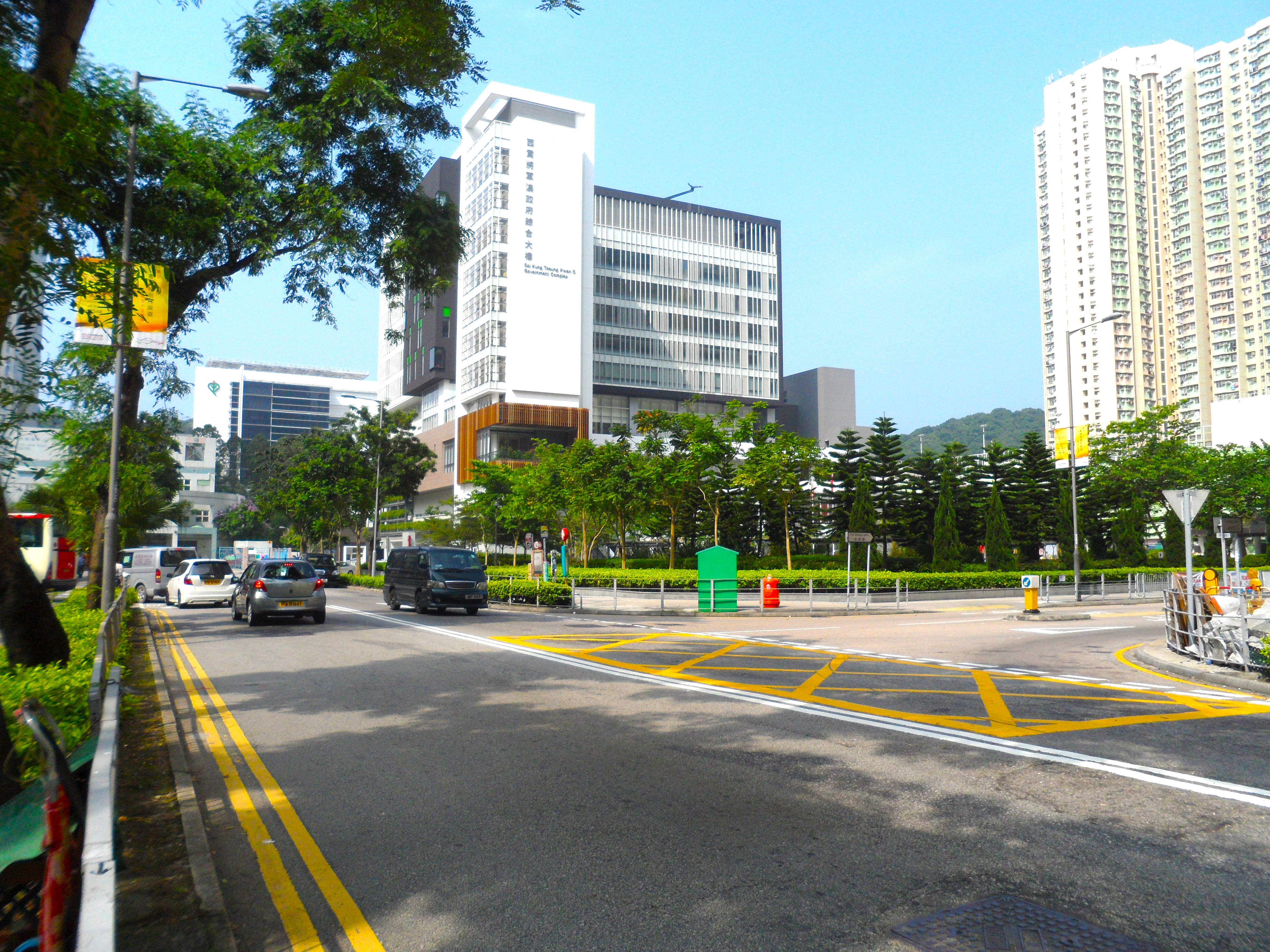 培成路與培成里交界處